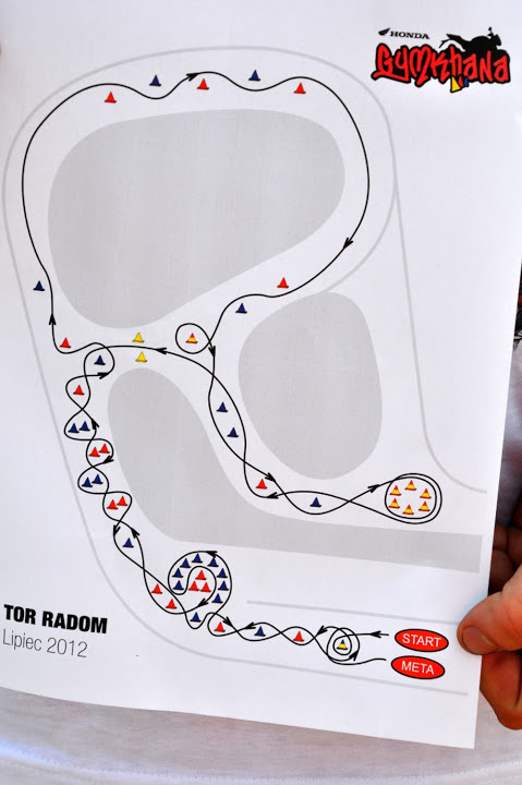 Przykład trasy konkursowej. Na każdych zawodach Gymkhana trasa jest inna, ujawniana tuż przez przejazdami konkursowymi. Trzeba jej się nauczyć na pamięć przed przejazdem - znajomość znaczenia kolorów pachołków nie wystarczy, by ją poprawnie przejechać.